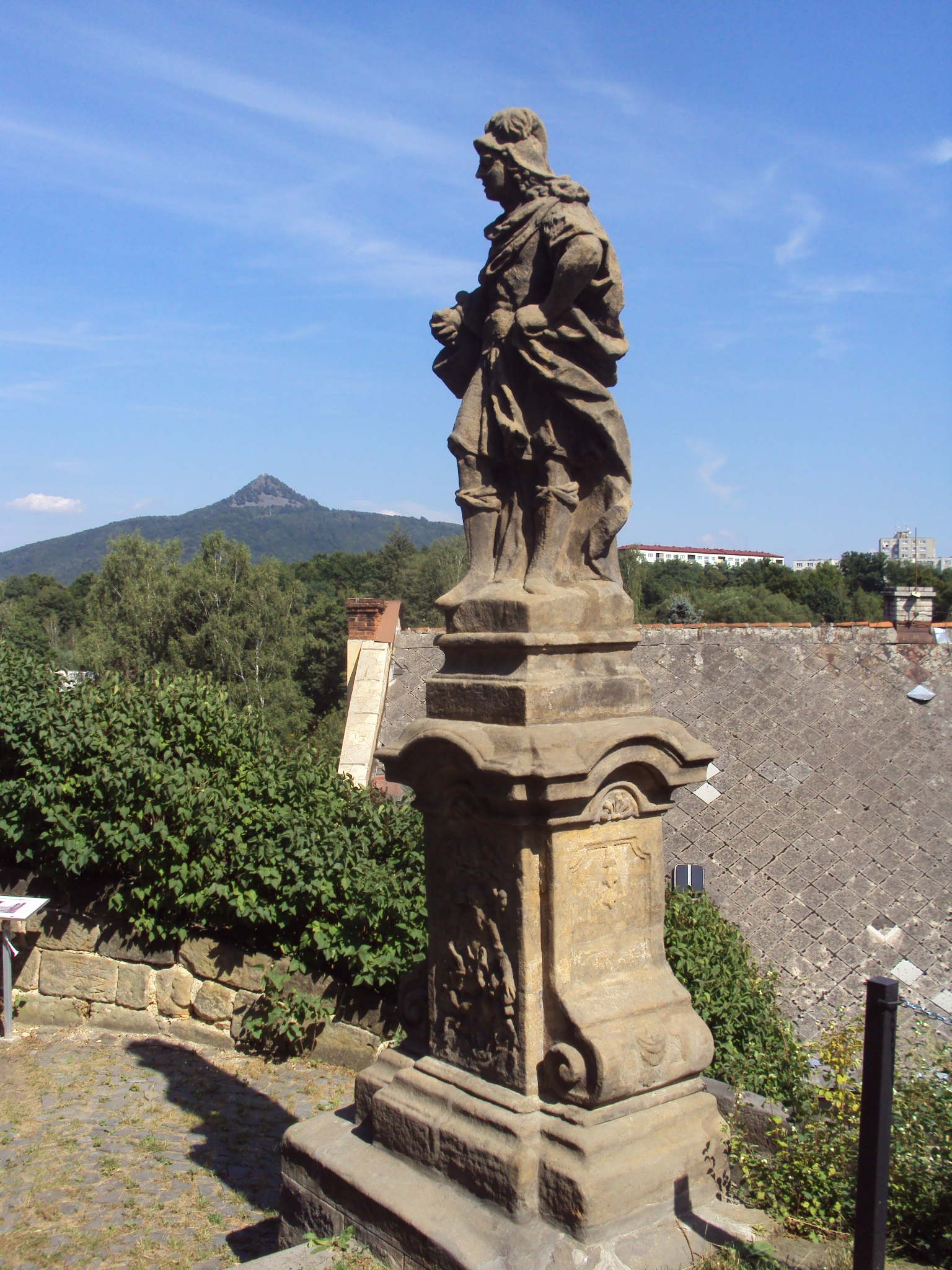 Jedna z soch pod mimoňským kostelem